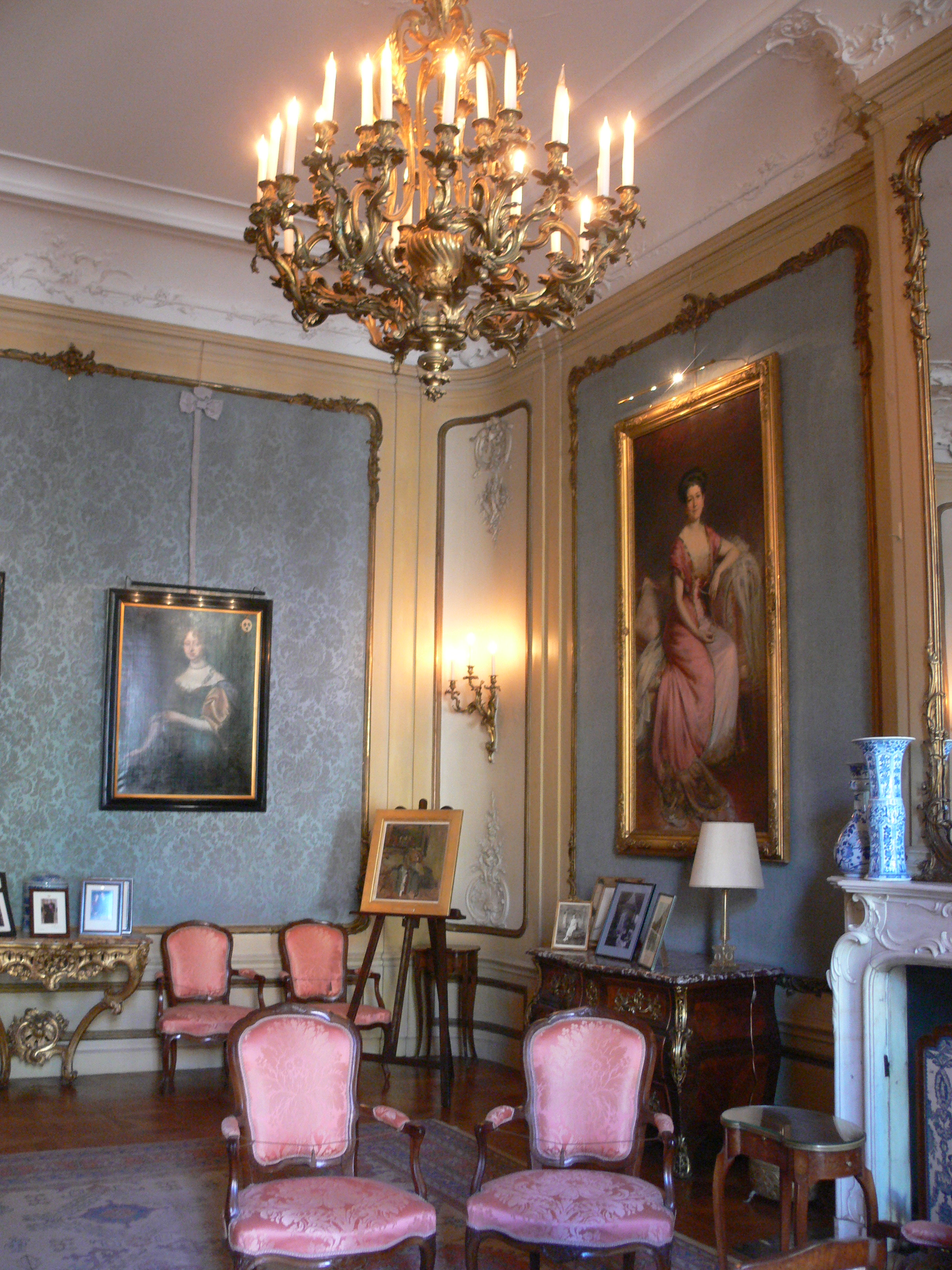 Amsterdam -Museum Van Loon